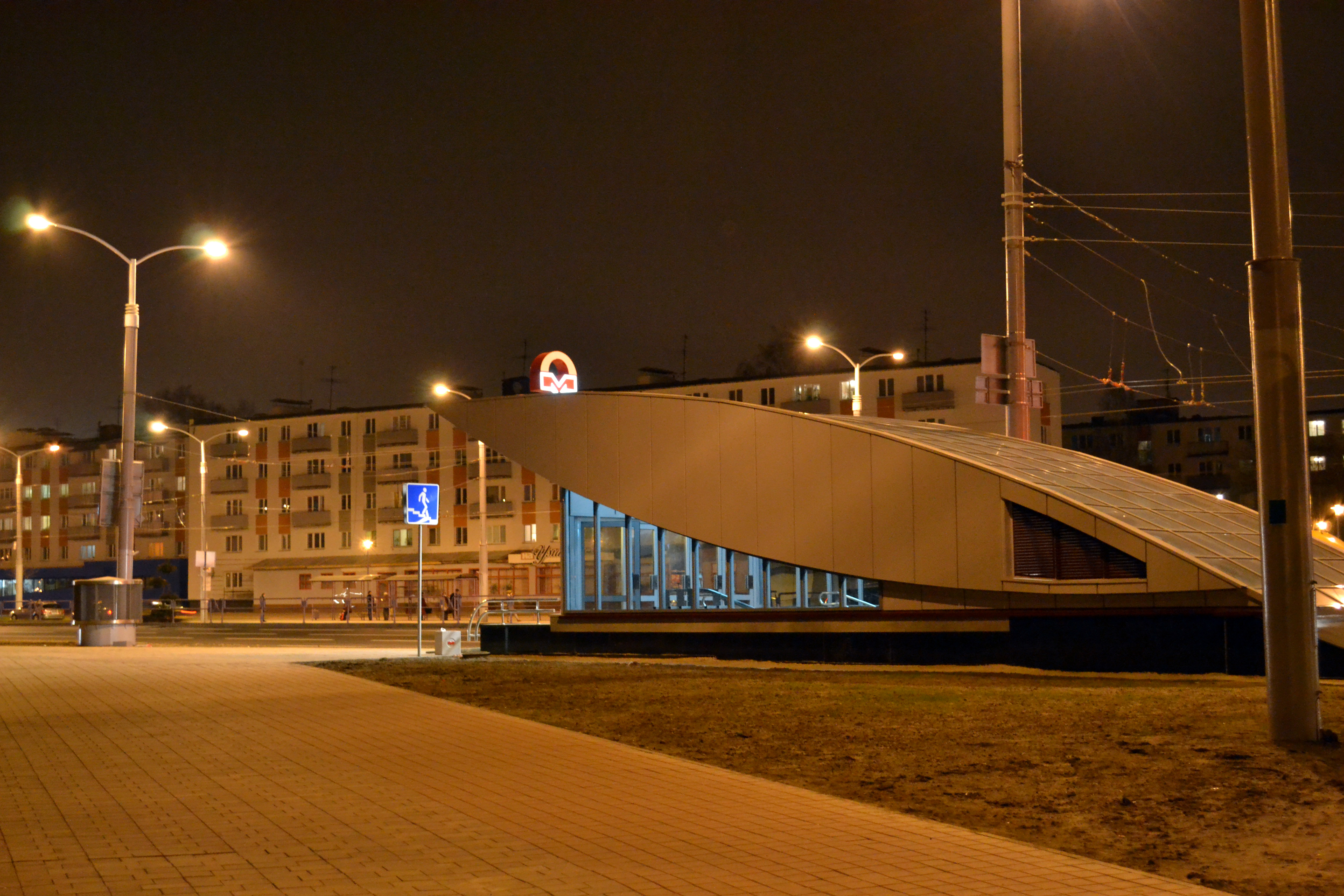 Беларуская (тарашкевіца): Станцыя мятро Міхалова.